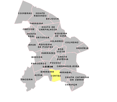 Localisation de Cortes.PNG sur la freguesia de Leiria.